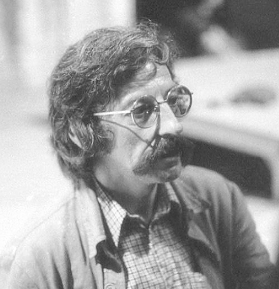 Portrait par Fernand Michaud au Festival d'Avignon 1973 .